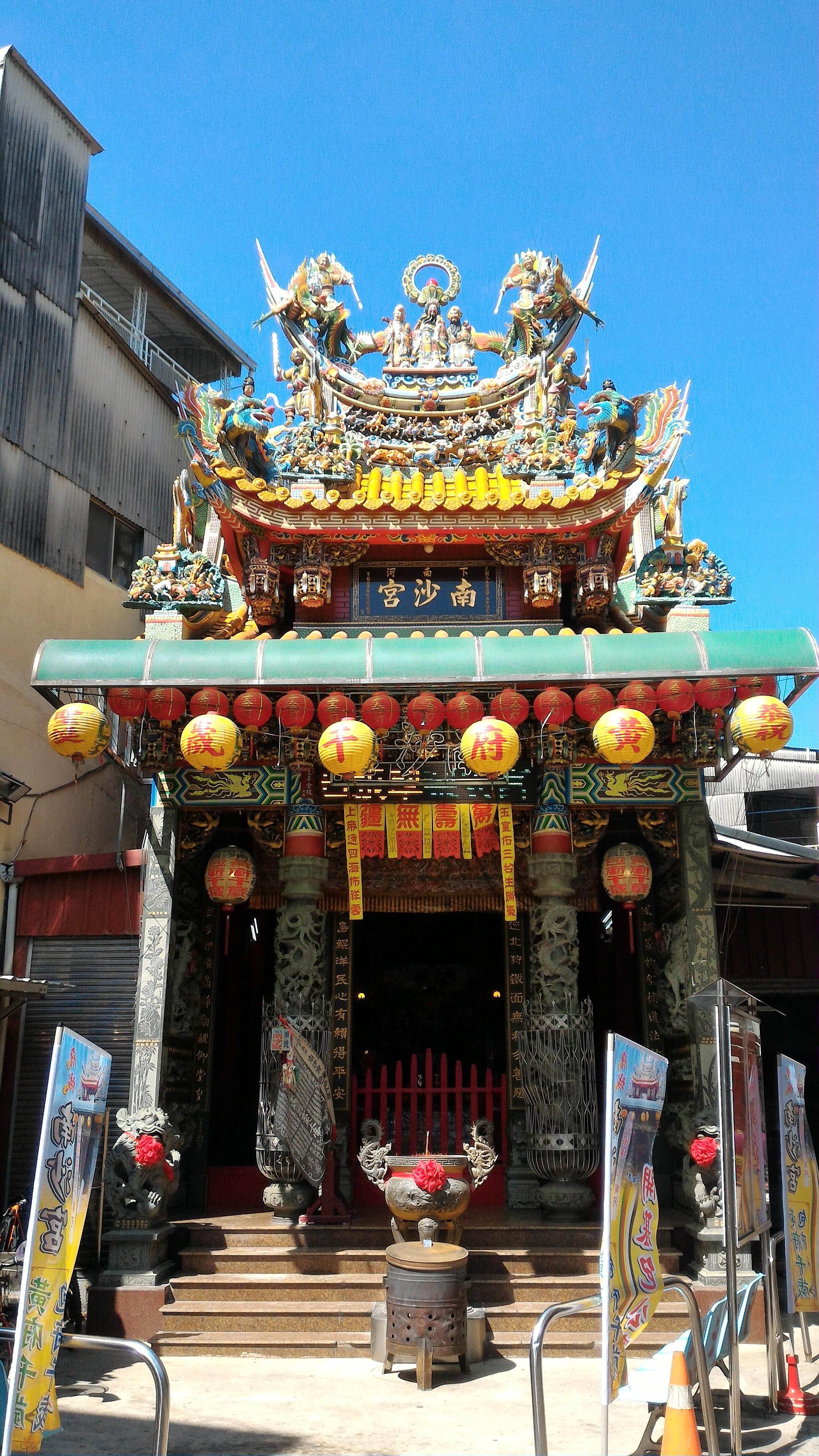 下南河南沙宮正面